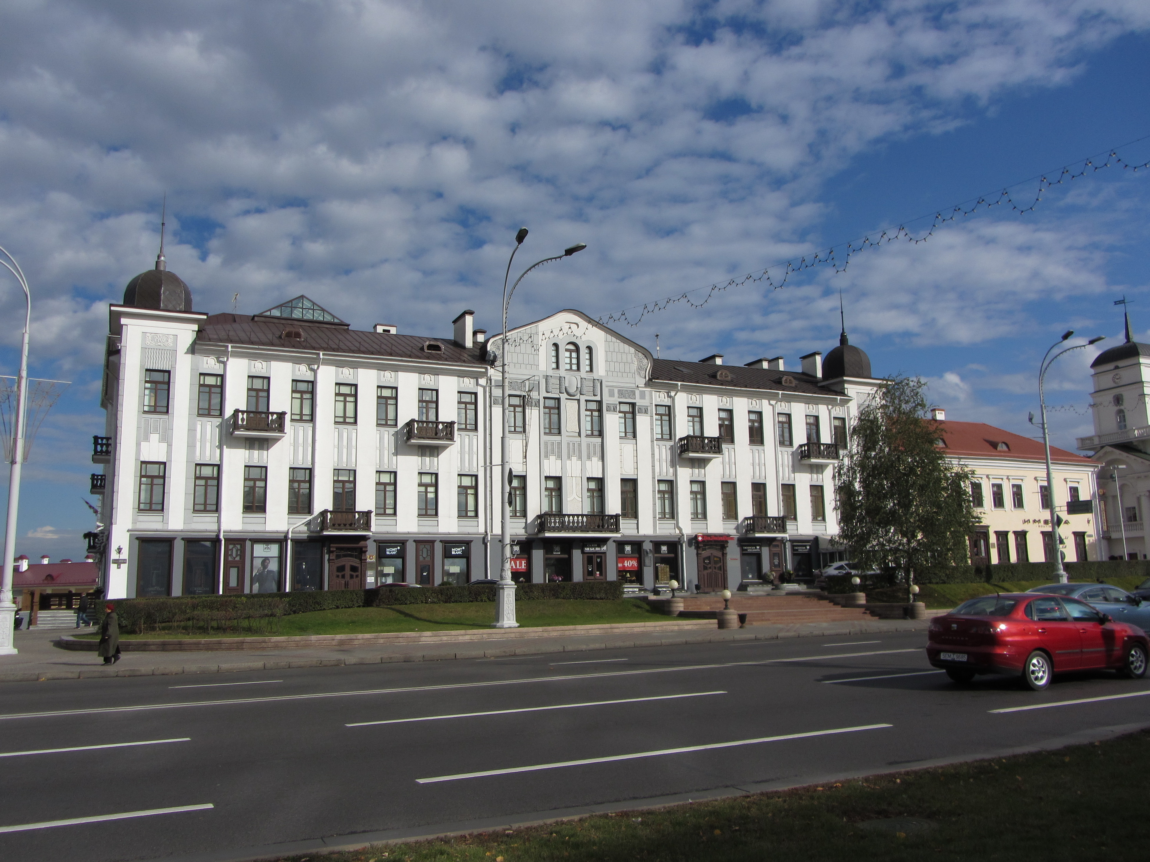 Беларуская (тарашкевіца): Будынак колішняга гасьцінага двара, Менск.